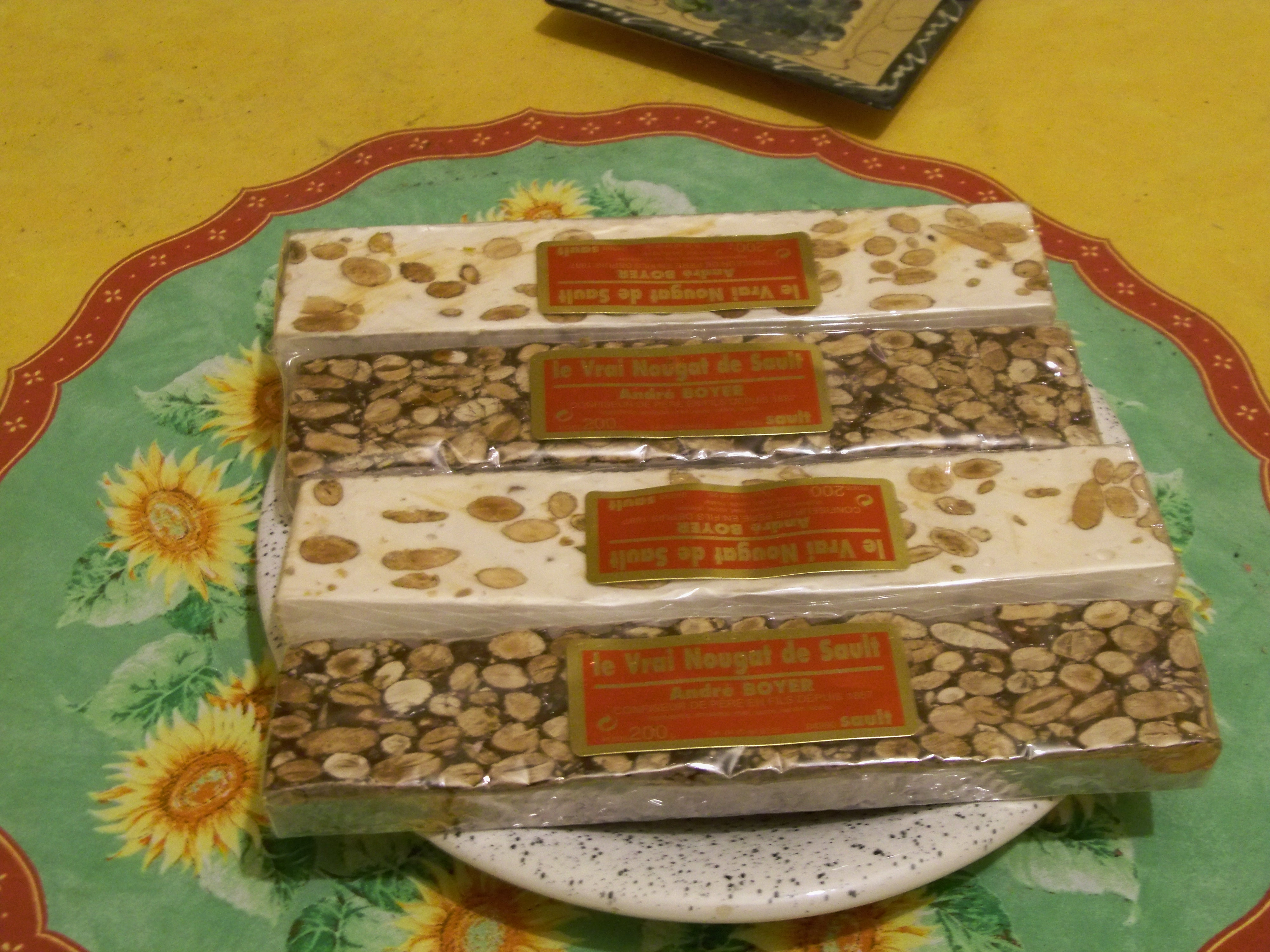 Nougats blanc et noir du confisseur Boyer (Sault, Vaucluse, France)